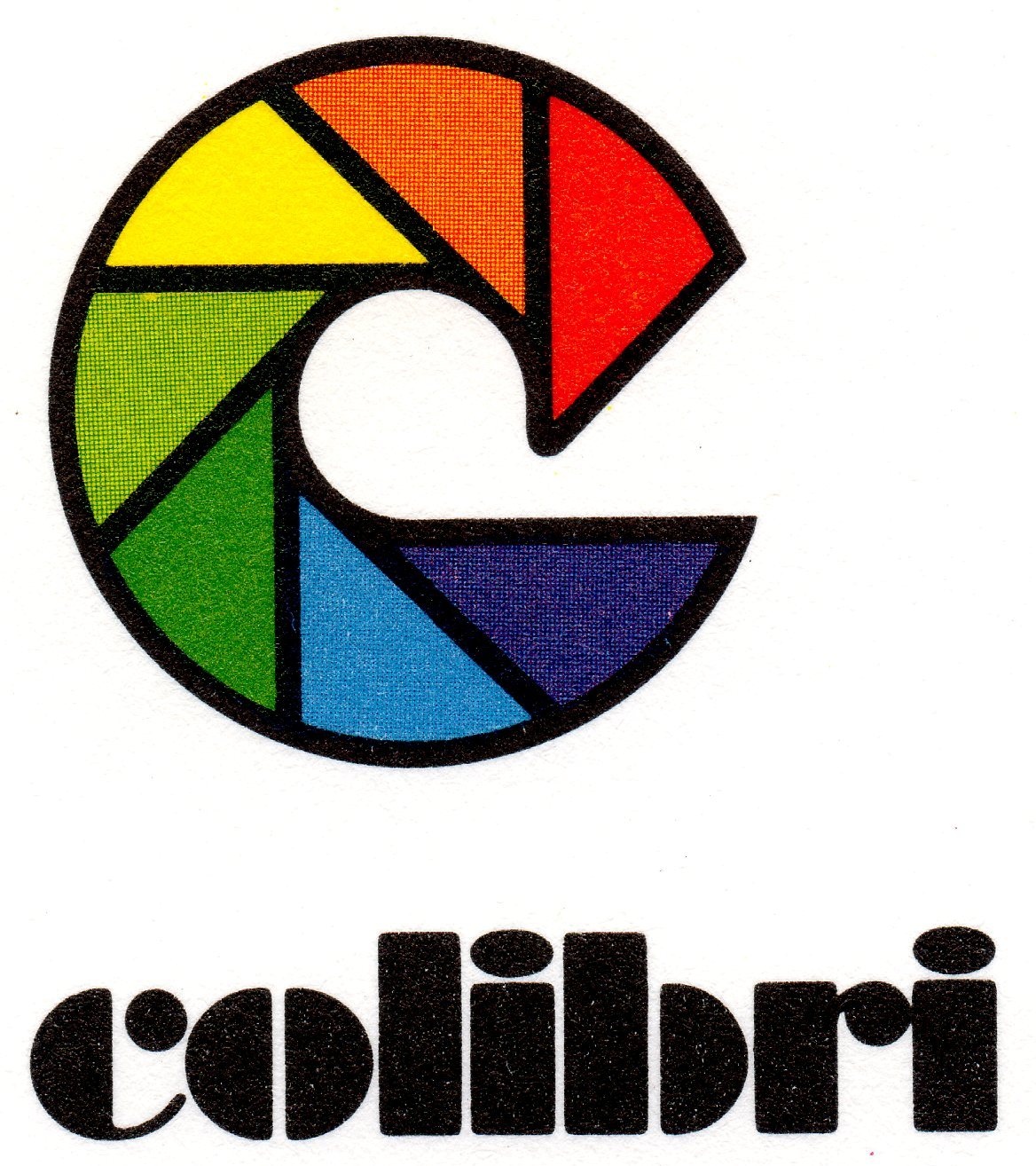 Logo des Fotogroßlabors Colibri